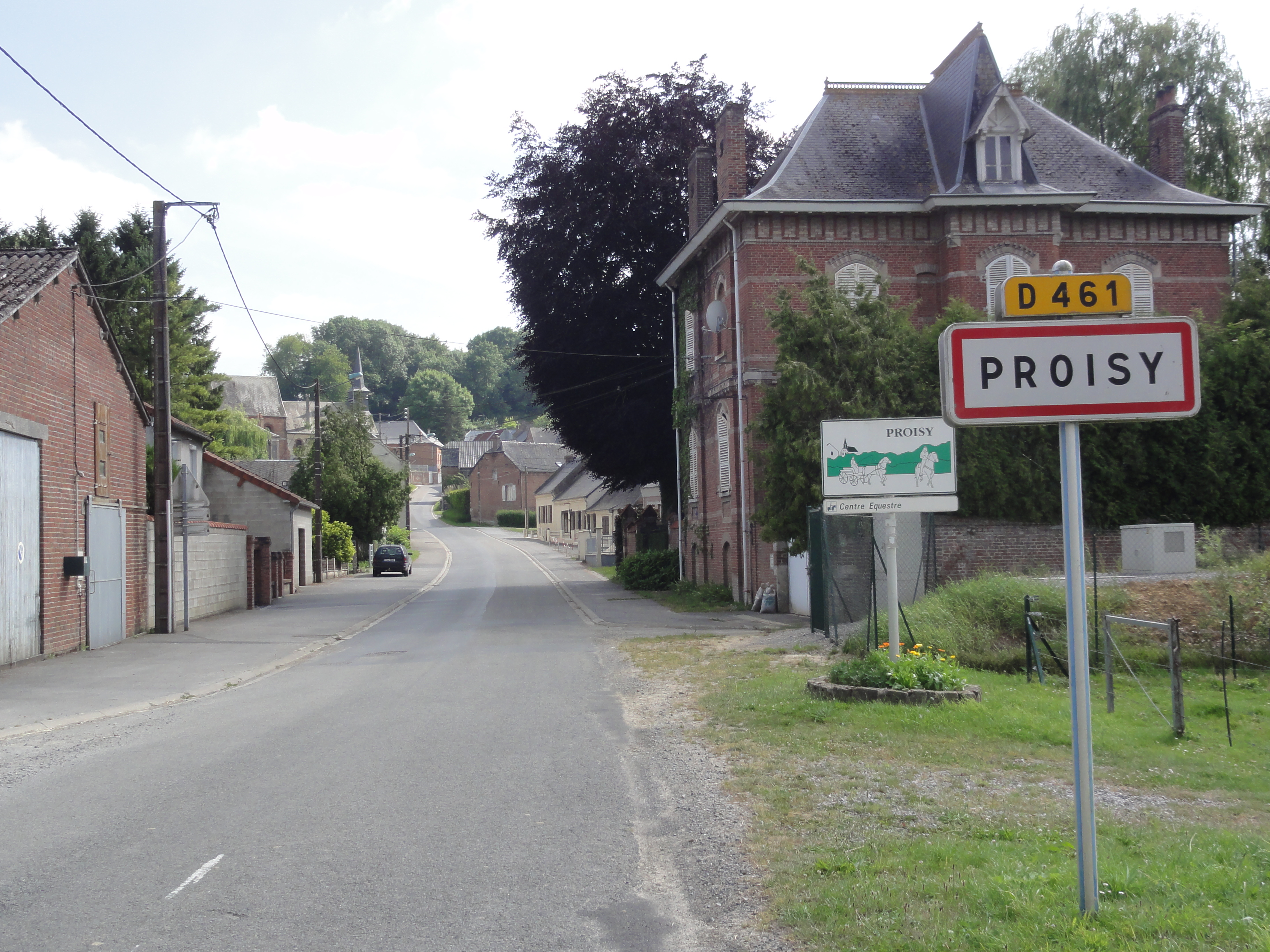 Proisy (Aisne) city limit sign